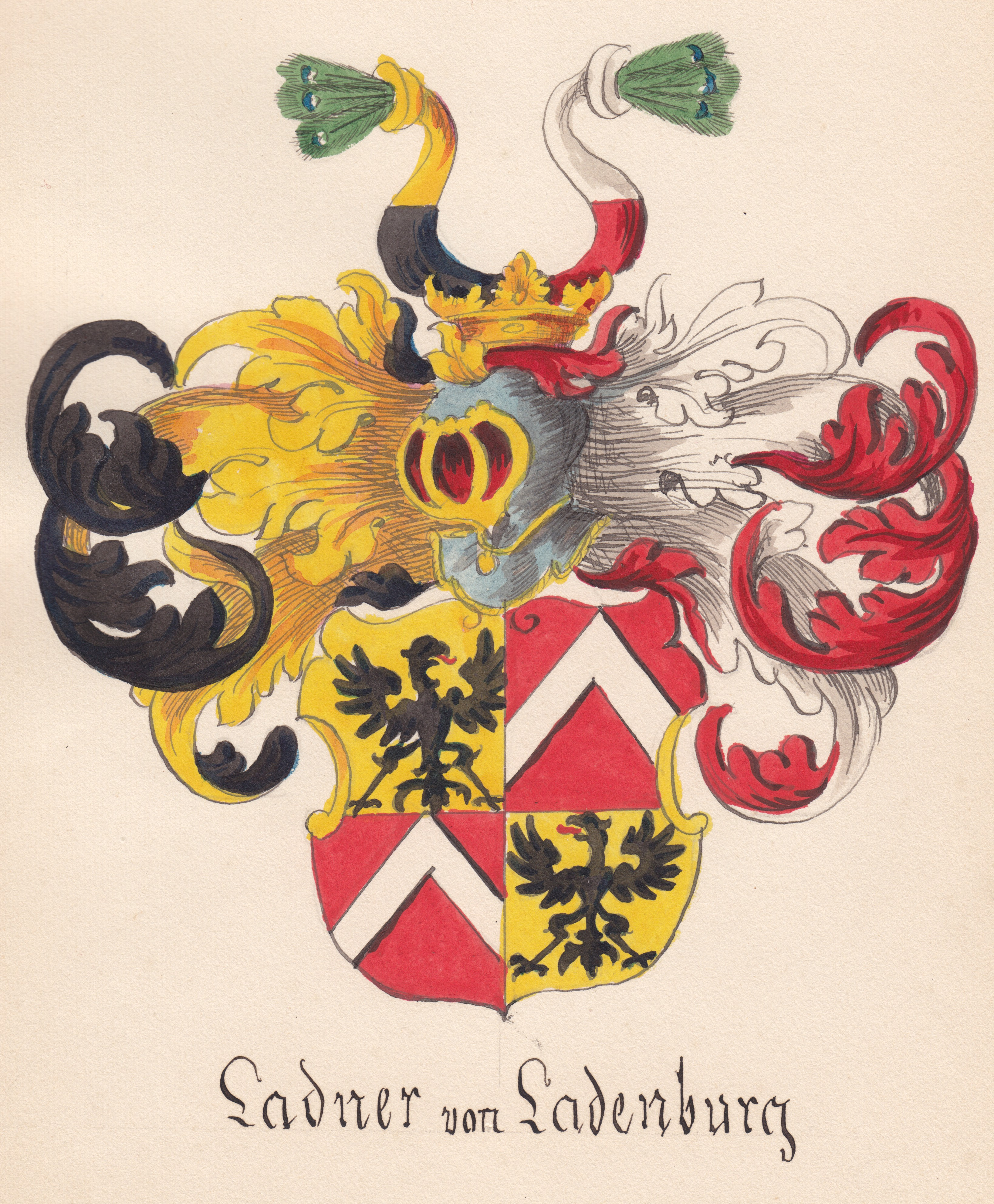 Wappen mit einem gevierten Schild, wobei sich im ersten und letzten goldenen Feld ein schwarzer ungekrönter Sandadler (=Steinadler) sowie im zweiten und dritten, jeweils roten Feld ein silberner Sparrbalken befindet. Auf dem Schild ruht ein gekrönter Helm, welcher zwei Büffelhörner trägt, wobei das Rechte unten schwarz und oben golden, das andere unten rot und oben silbern ist; beide Büffelhörner tragen in ihren Öffnungen Pfauenfedern.